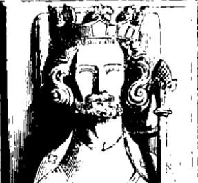 Gisant de Pépin le Bref (714-768)